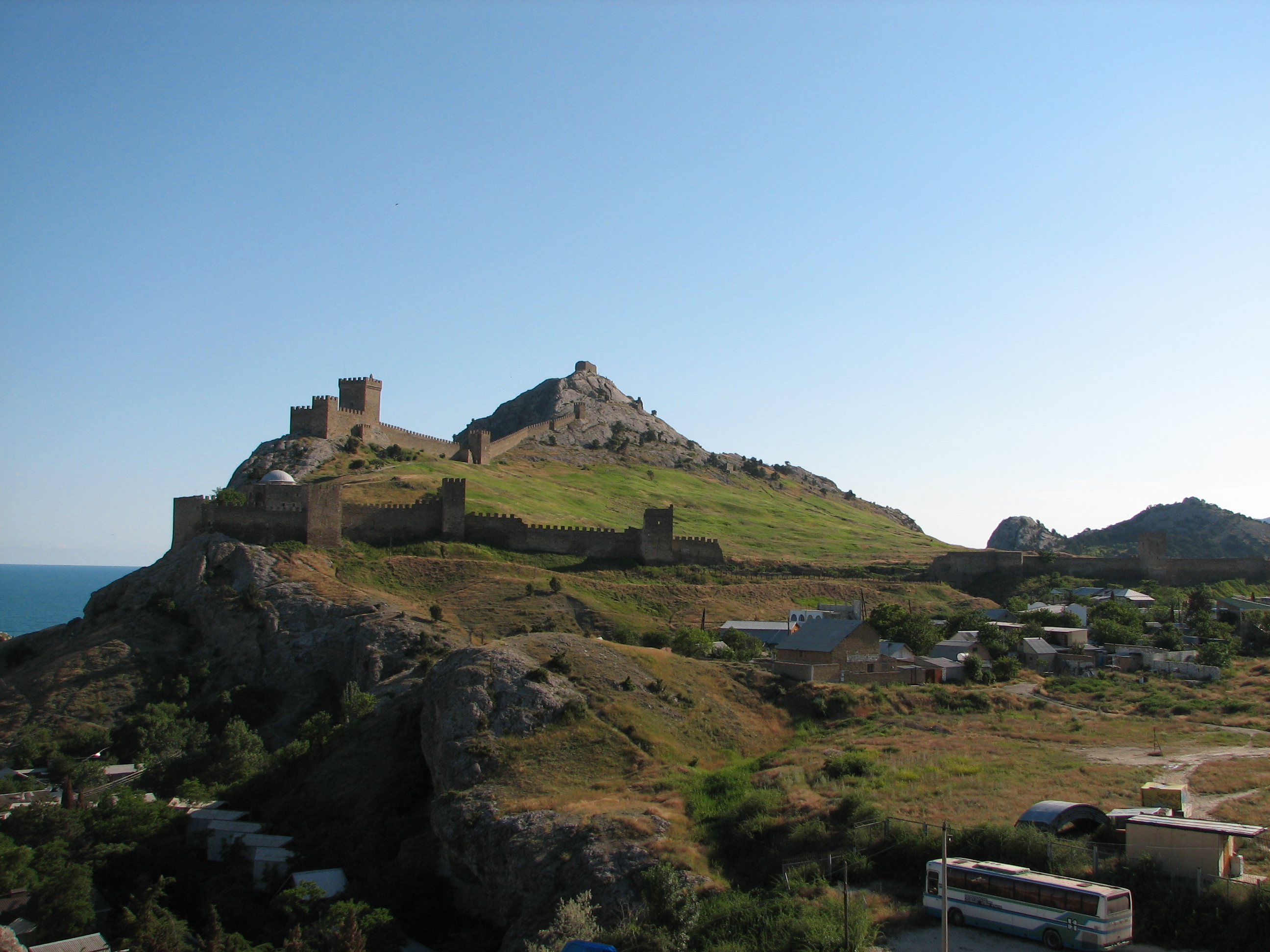 Вид на Генуэзскую крепость